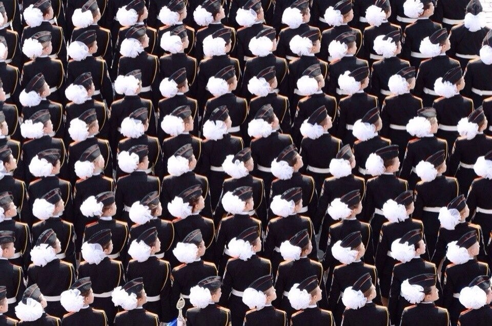 Парад победы